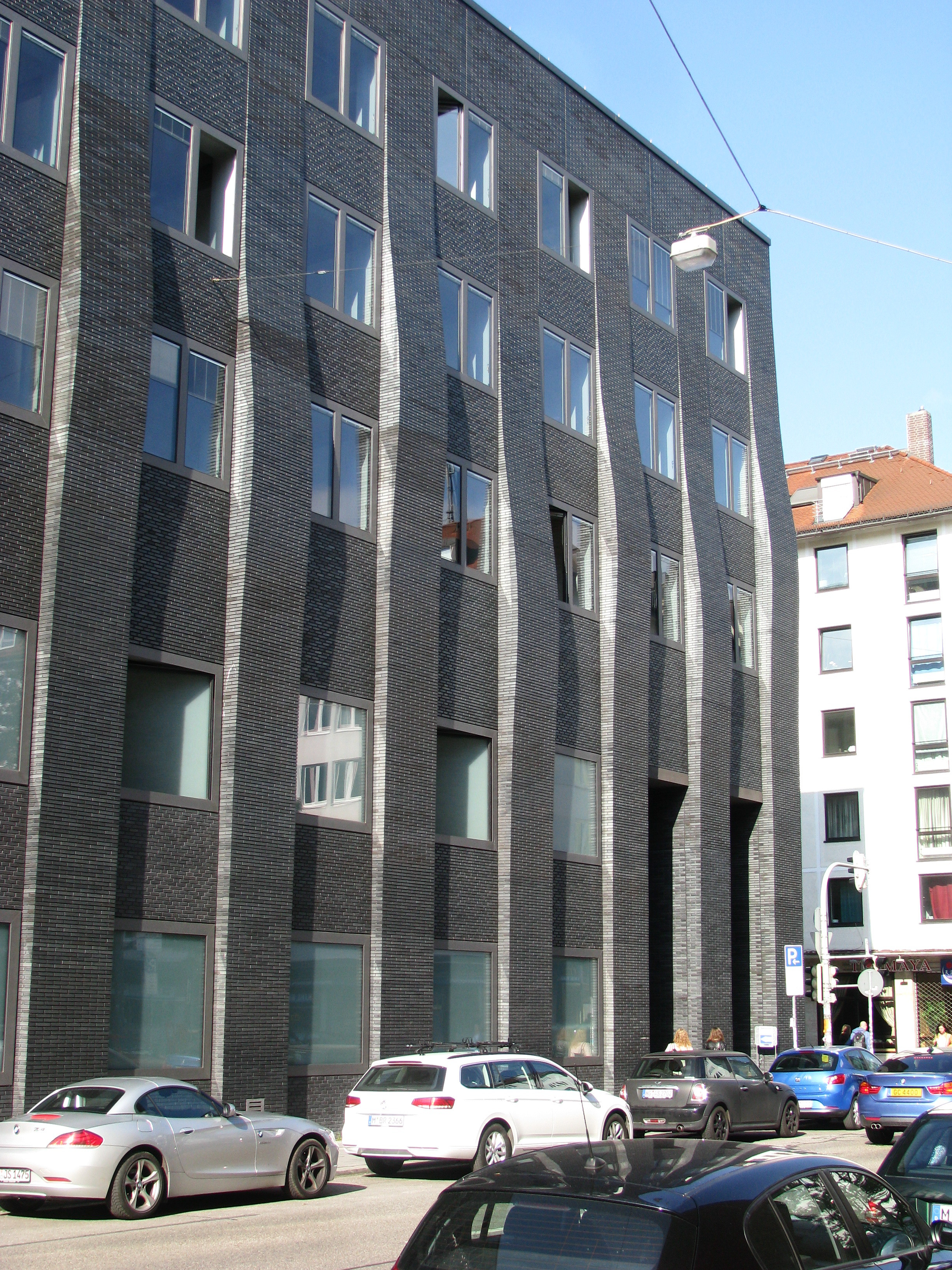 Gebäude 5 der Technischen Universität München an der Theresienstraße, Ecke Luisenstraße